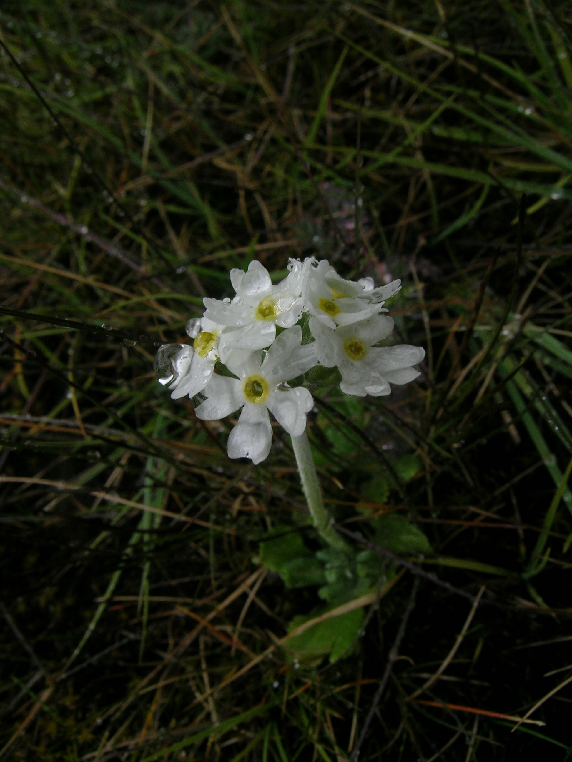 Primula magellanica, Ushuaia (Arg)